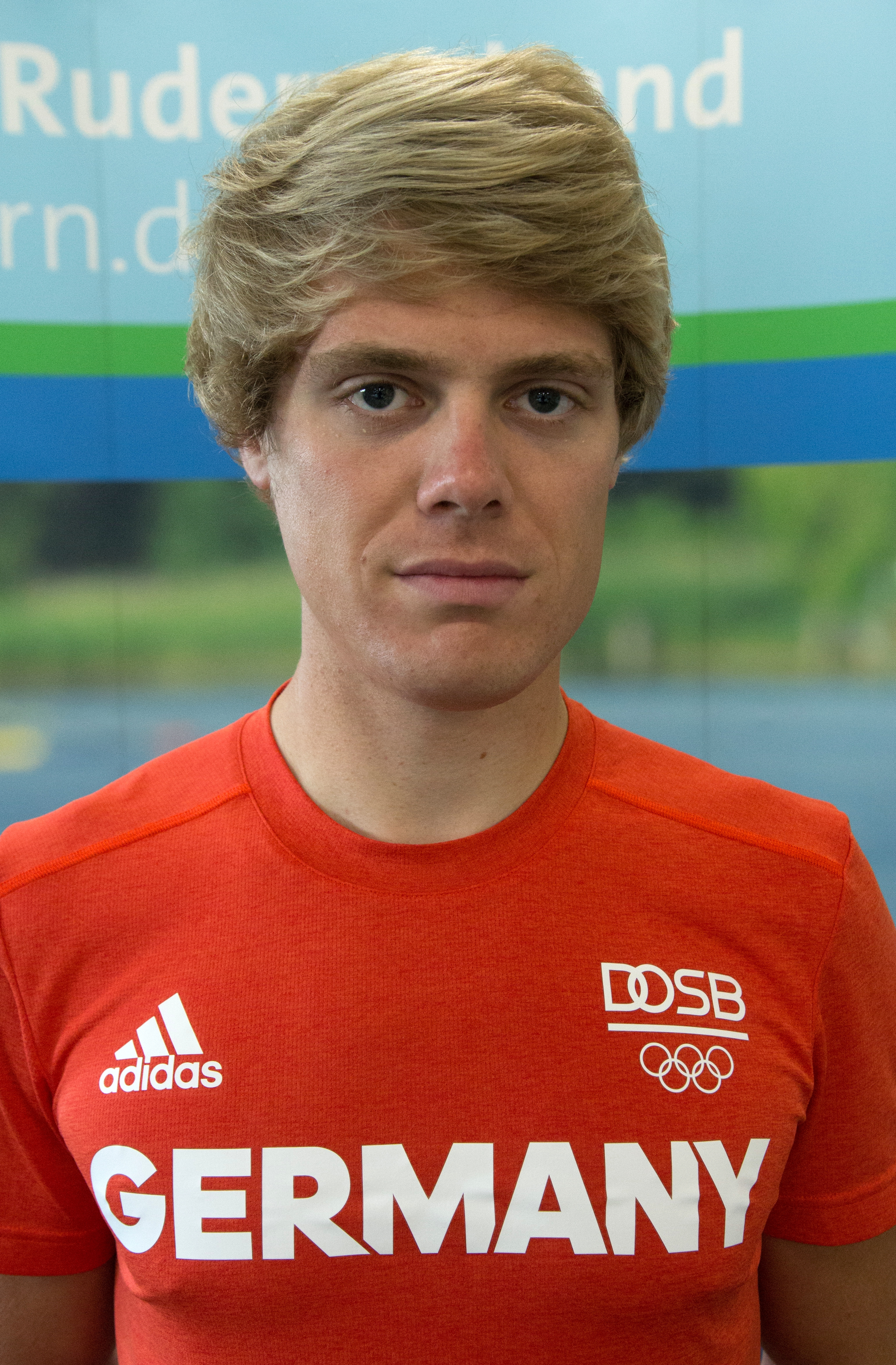 Medientag des Ruderverbandes in der Ruderakademie Ratzeburg am 6. September 2017: Jason Osborne